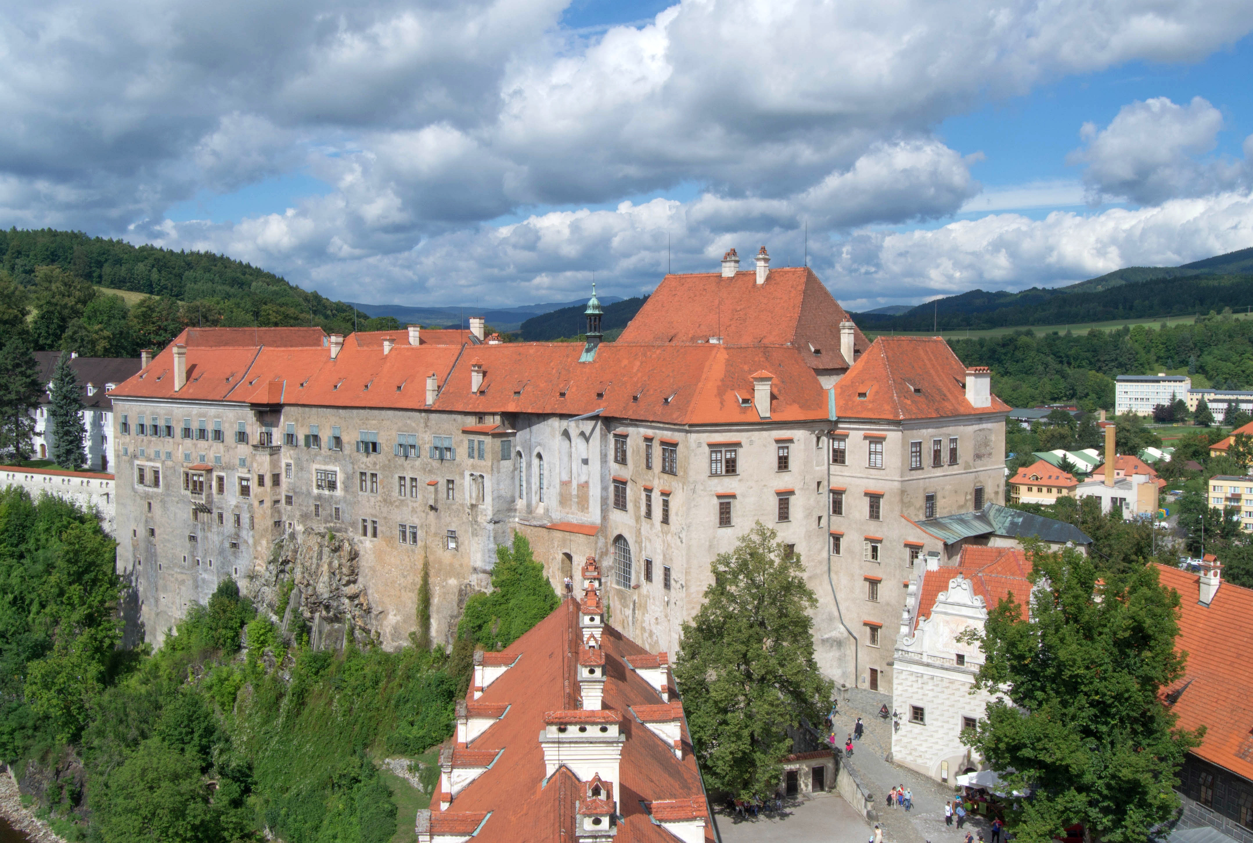 Castello